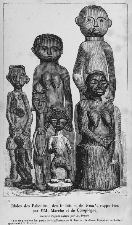 Idoles des Pahouins, des Gallois et de Ivéia, rapportées par MM. Marche et de Compiègne. From L'Afrique équatoriale. Okanda, Bangouens, Osyéba. Par le marquis de Compiègne. Ouvrage enrichi d'une carte spéciale et de gravures sur bois dessinées par L. Breton d'après des photographies et des croquis de l'auteur (published 1885).